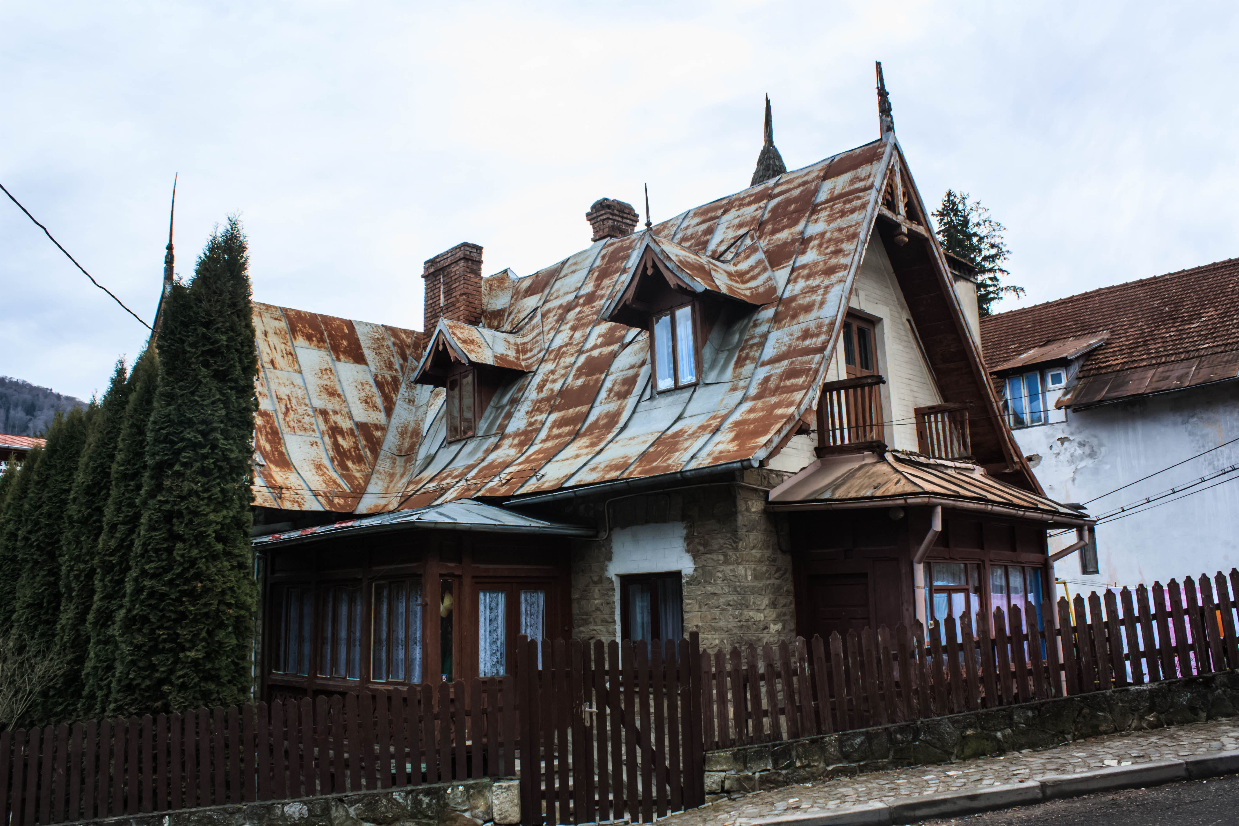 Casa Viorica Kogălniceanu